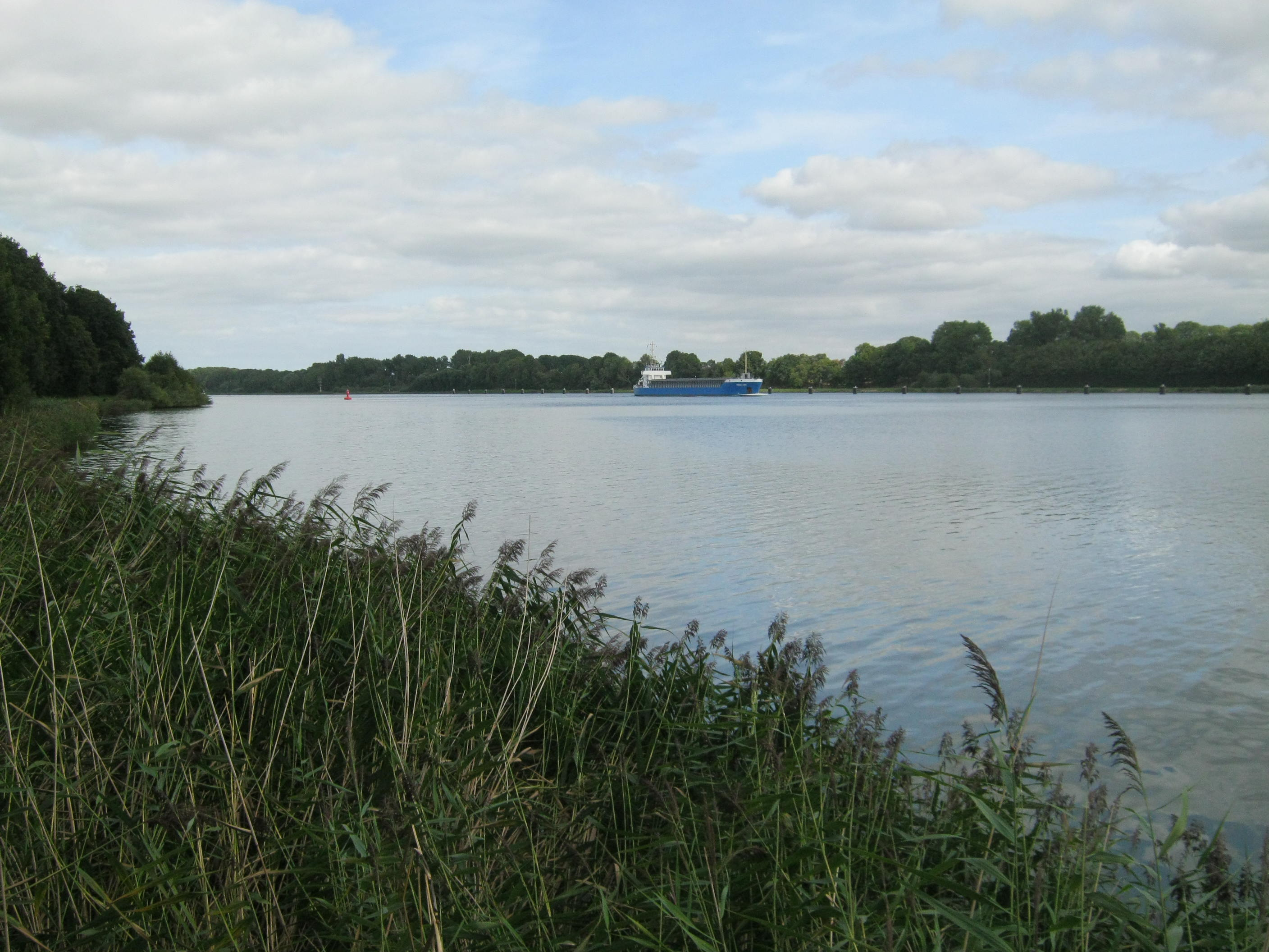 Schirnauer See, Blickrichtung Osten.